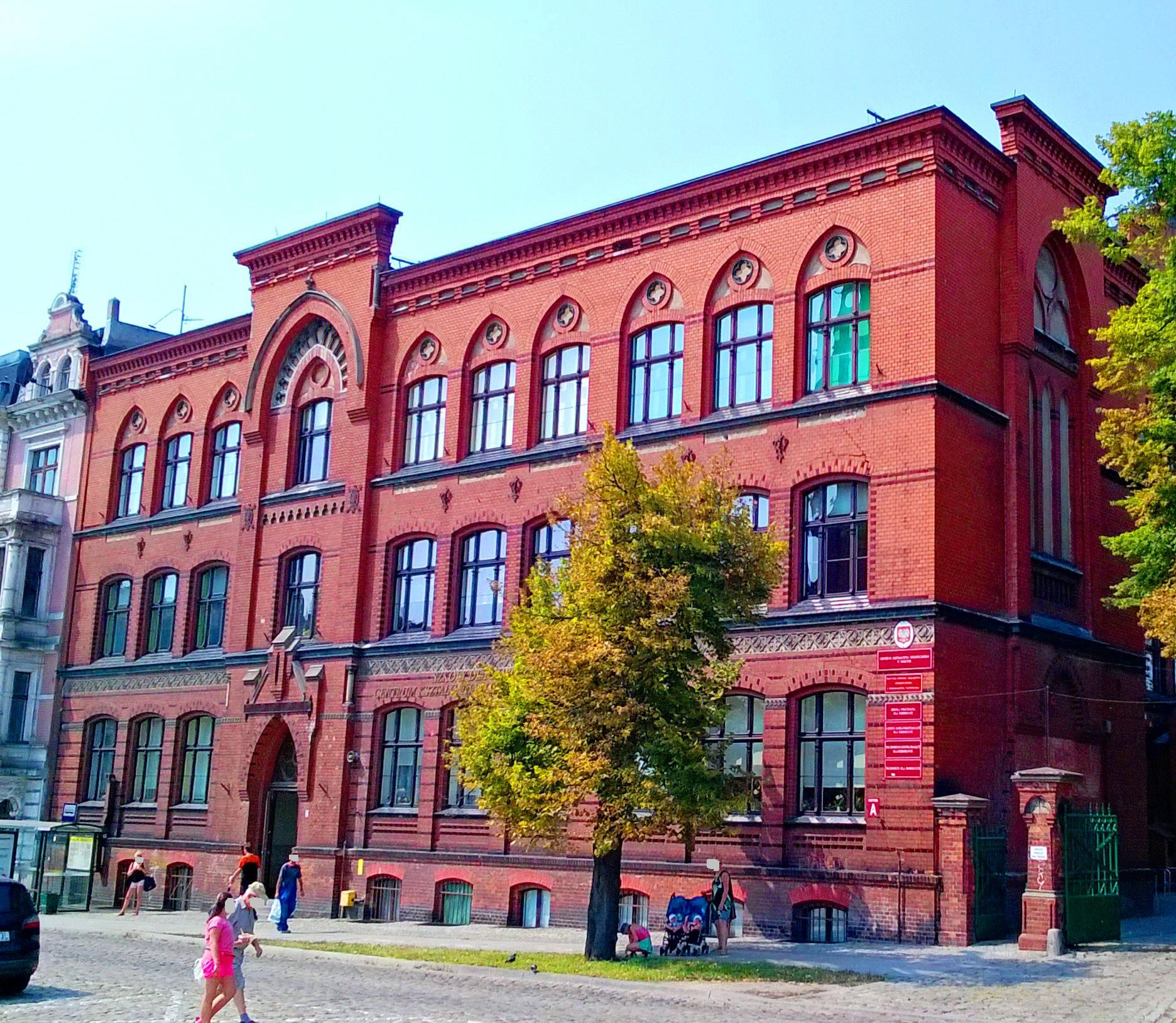 Budynek Centrum Kształcenia Ustawicznego w Toruniu